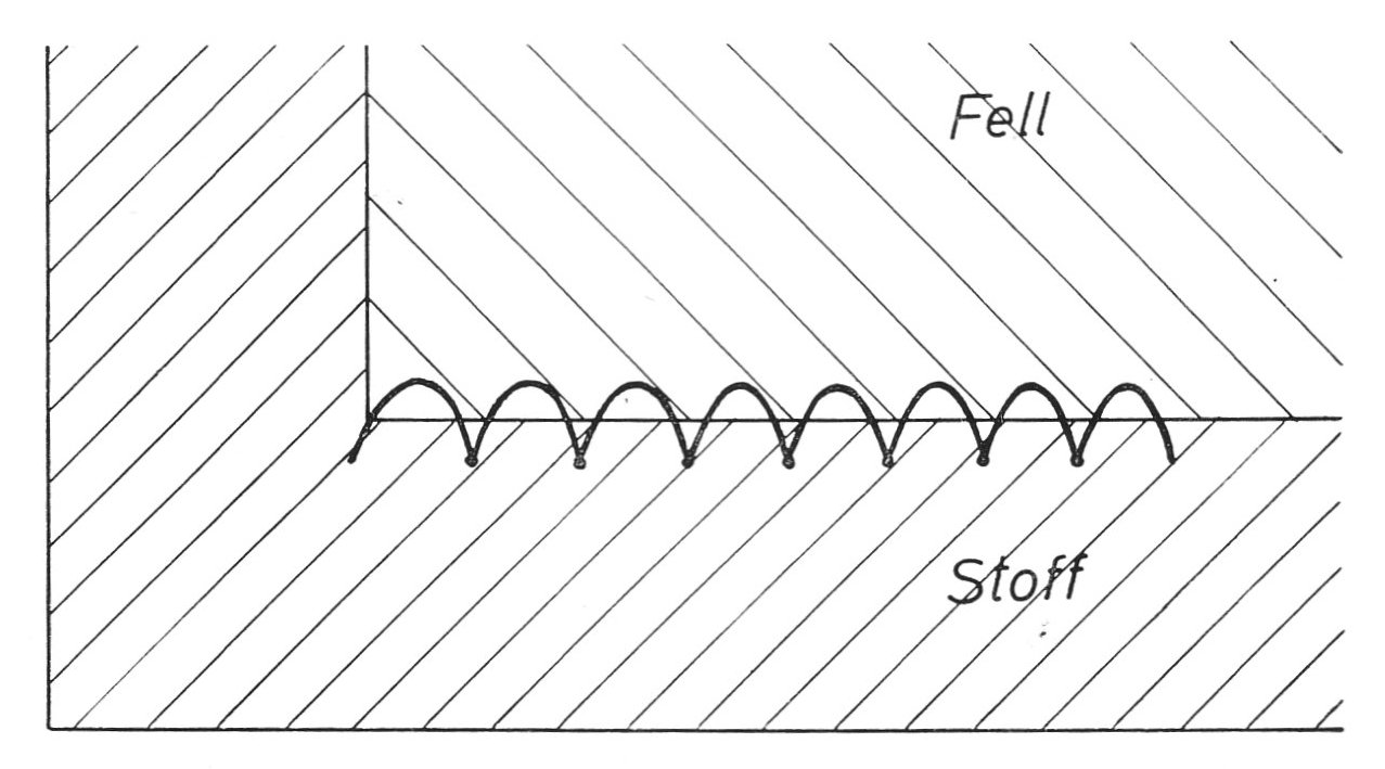 Nähte in der Kürschnerei: Absatz „Nähtechnik, Ledernähte, Haarnähte, Anschlagen“.